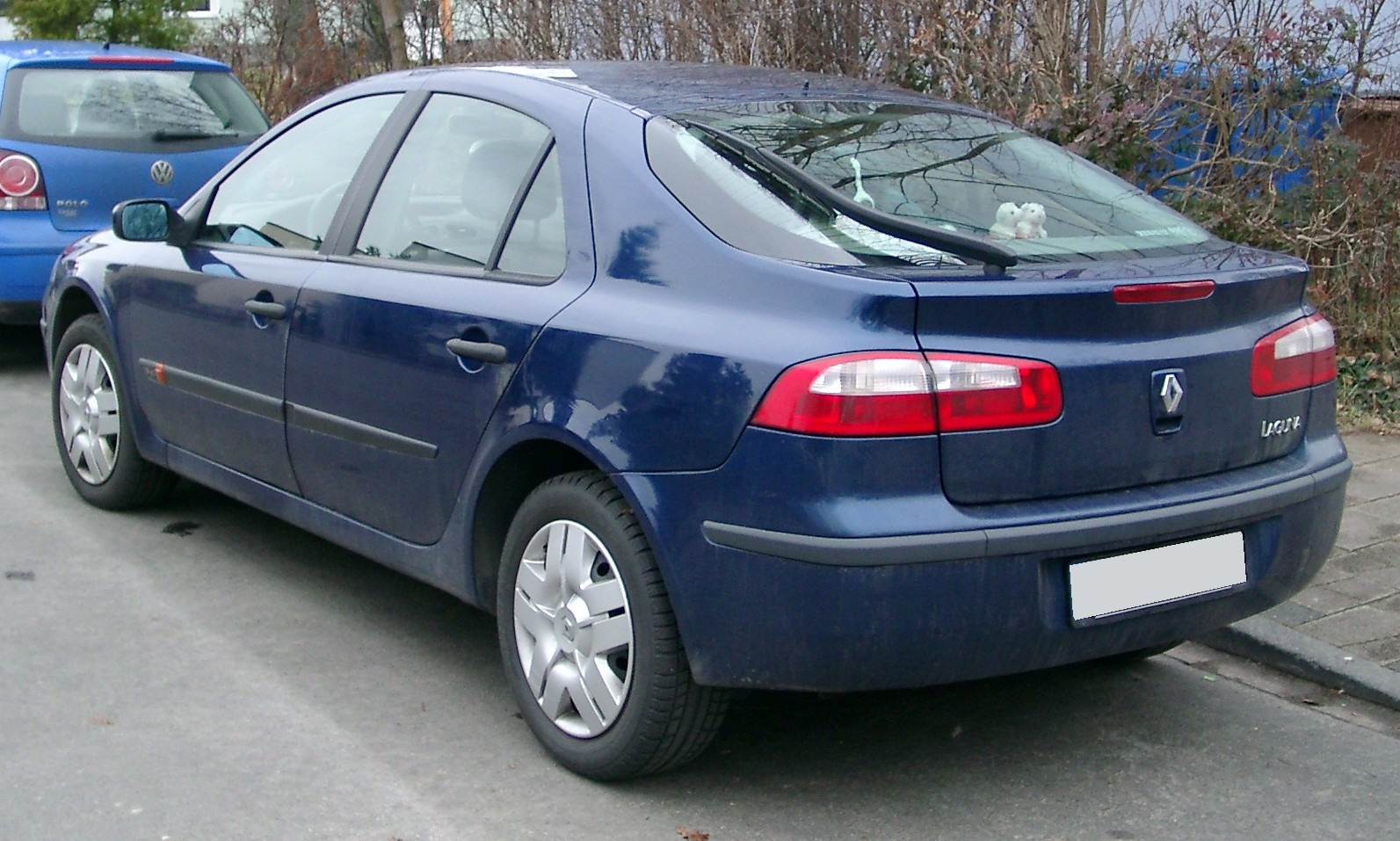 Renault Laguna, 2. Generation